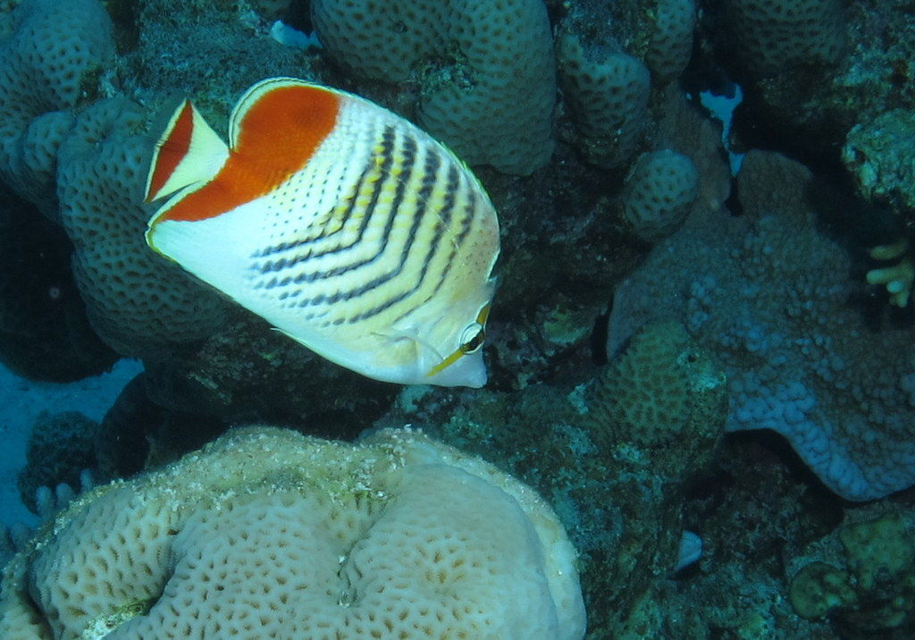 En Gota Abu Ramada, Egipto, Mar Rojo.